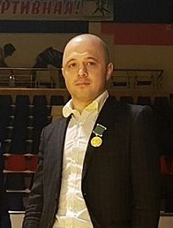 Российский дзюдоист Алим Шалауатович Гаданов.